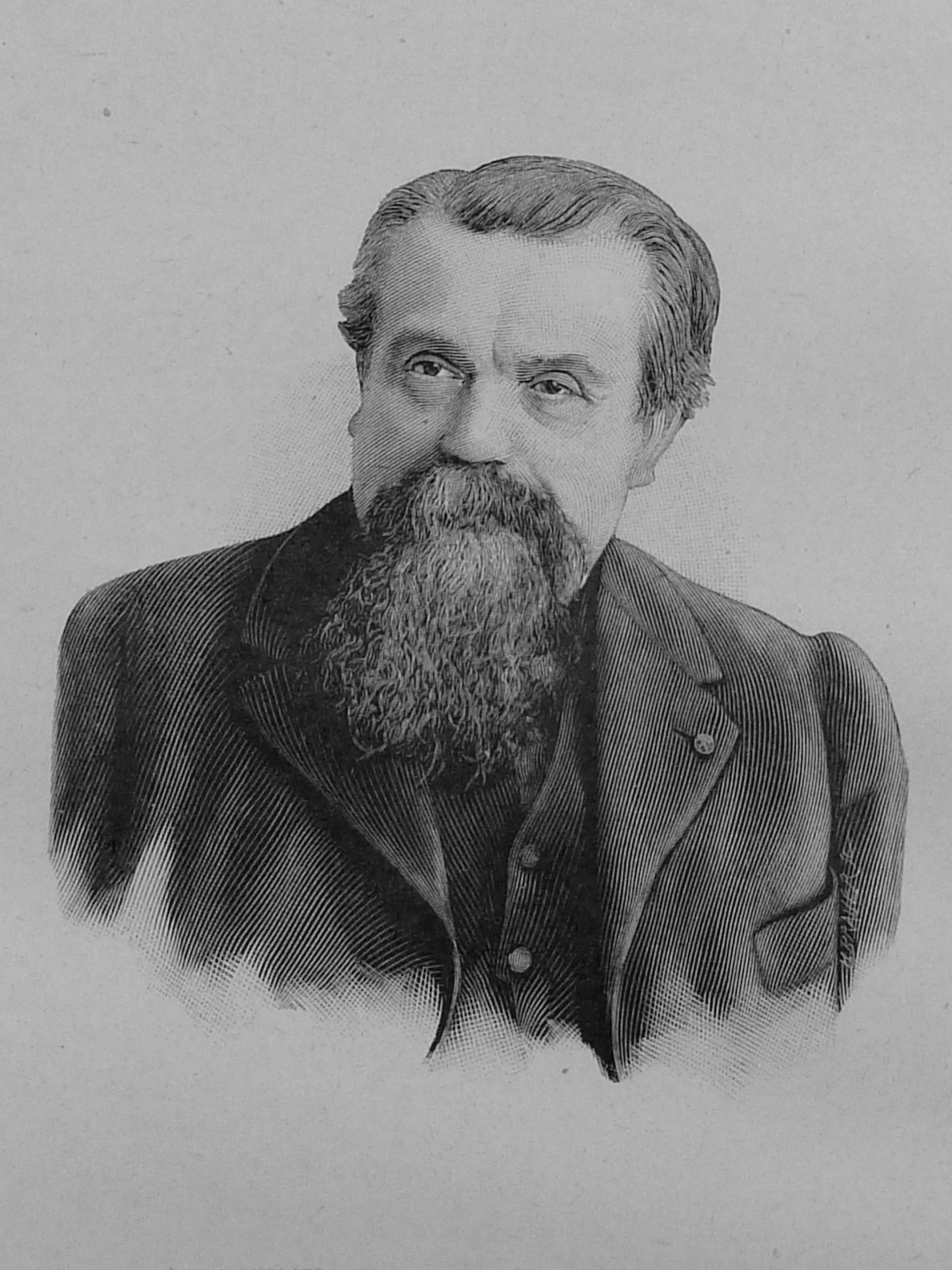 Théodore Jules Ernest Hamy, gravure d'après photo dans Figures contemporaines Album Mariani tome XI, 1908. graveur indéterminé